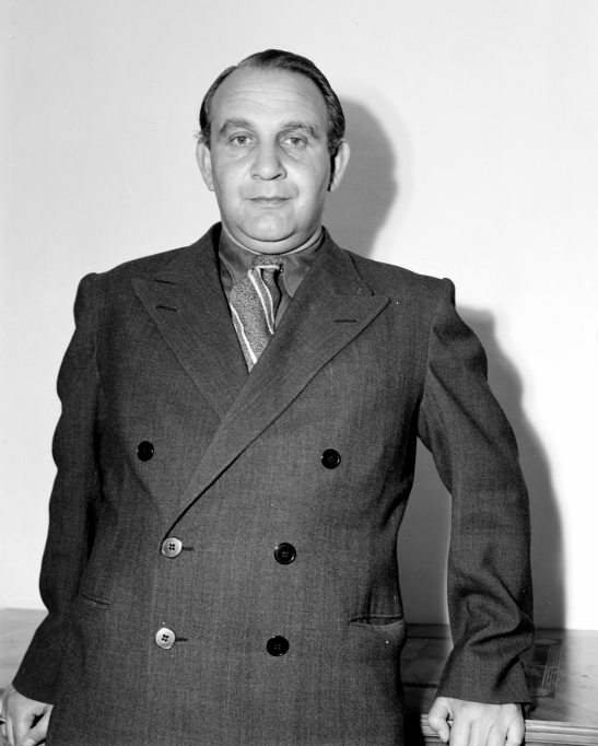 Fritz Eckhardt in der Garderobe des Salzburger Festspielhauses.